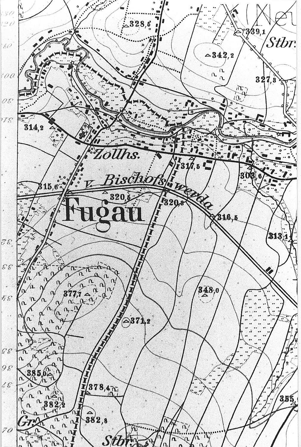 Original image description from the Deutsche Fotothek Oppach. Fugau, aus: Meßtischblatt, Sekt. Neusalza, 1883